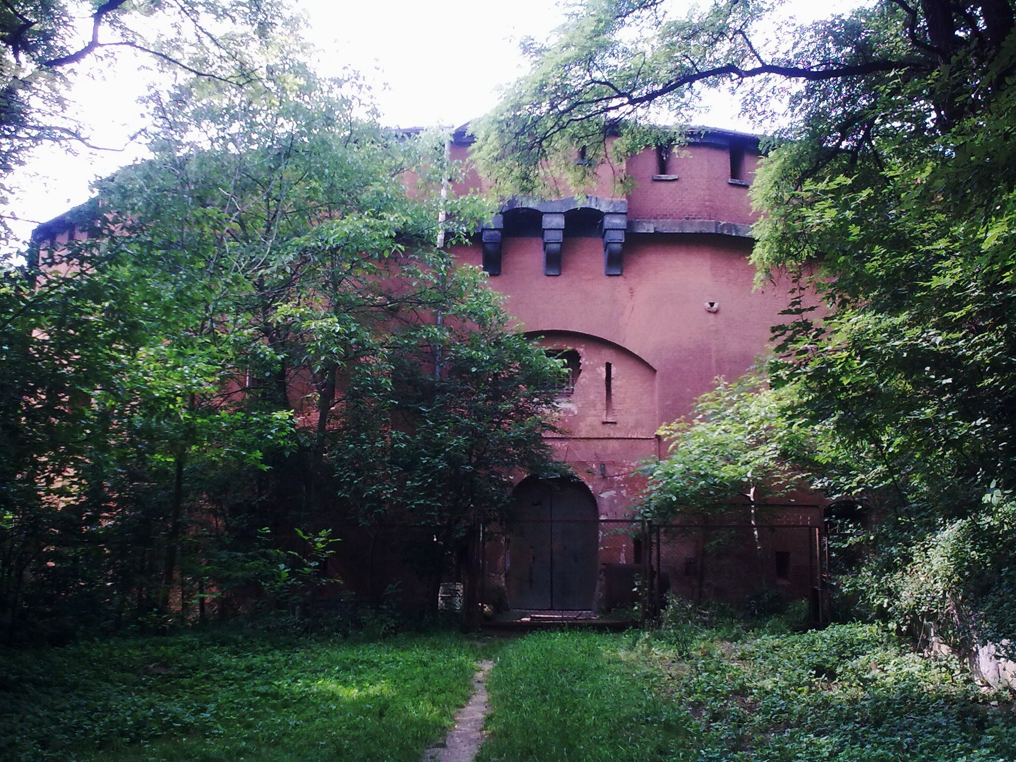 Baszta w cytadeli we Lwowie, magazyn książek